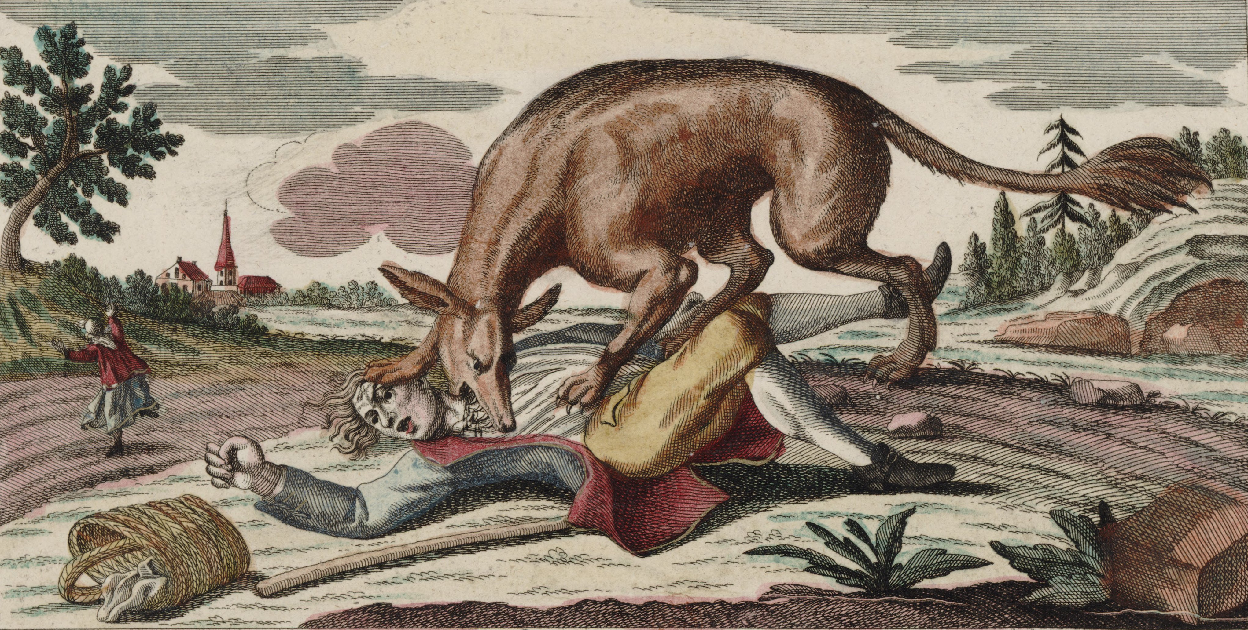 La bête du Gévaudan, gravure à l'eau-forte